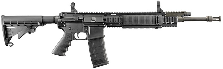 Ruger SR-556 Rifle - 5.56 NATO - Standard